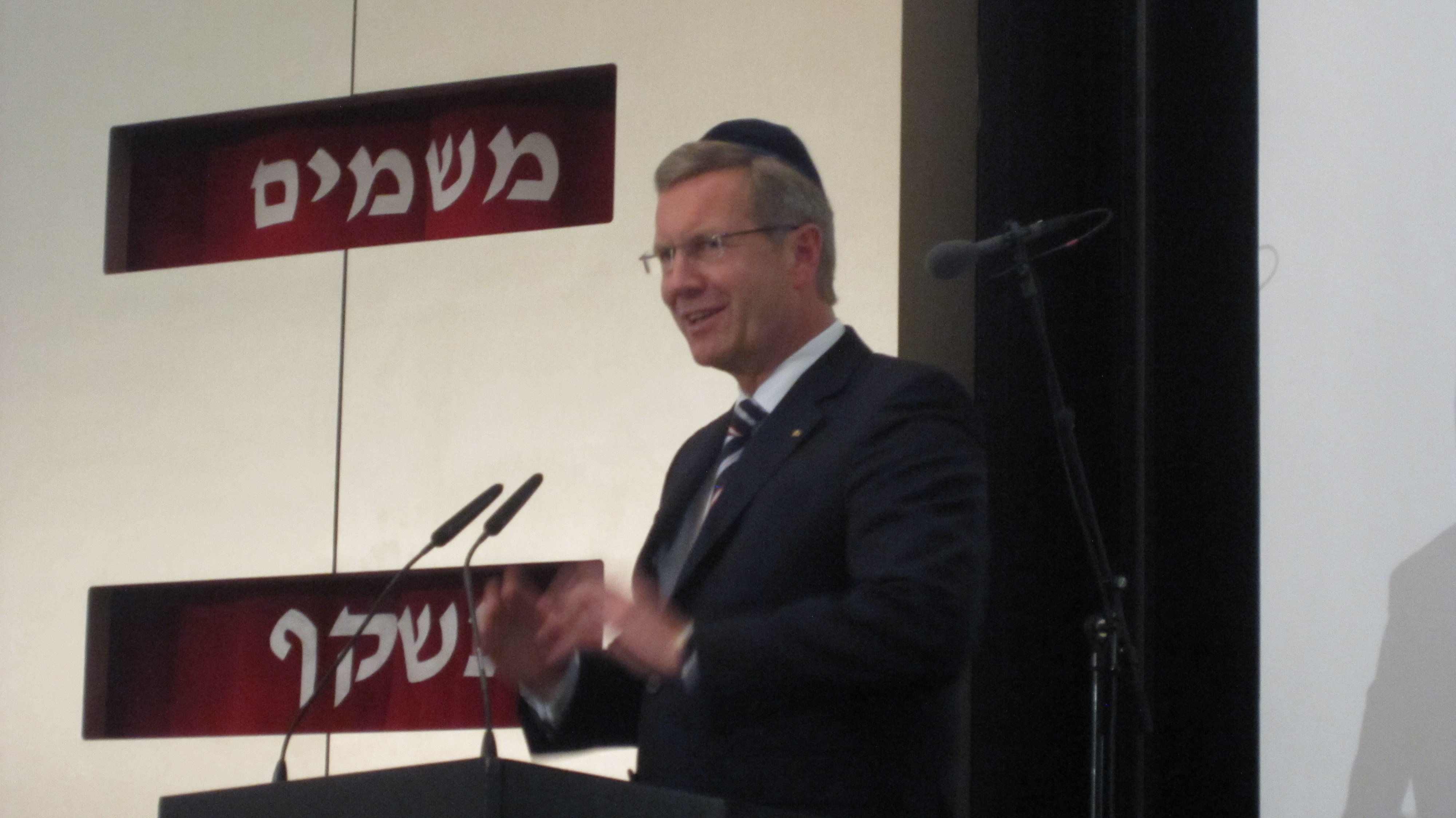 Bundespräsident Christian Wulff bei der Einweihung der Speyerer Synagoge